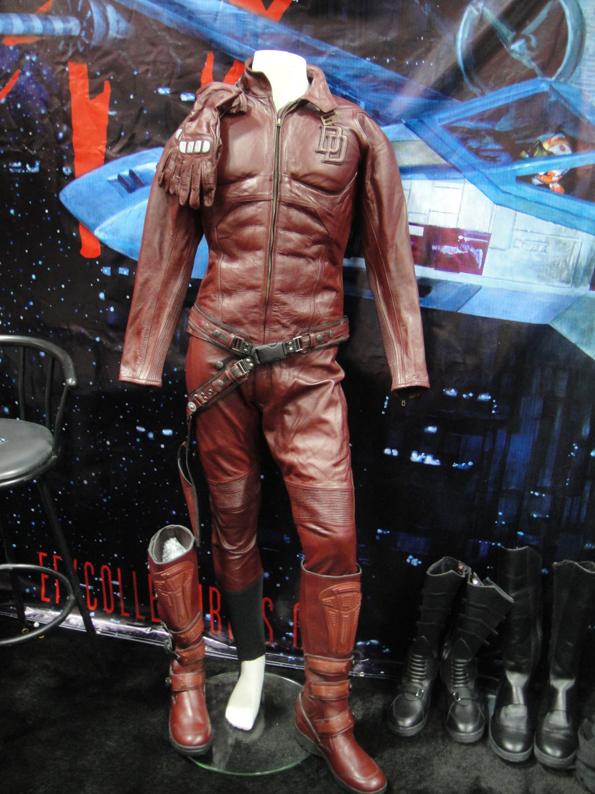 San Diego Comic-Con 2011 - Daredevil movie costume